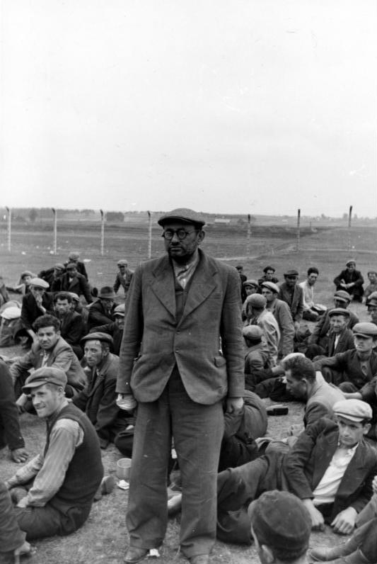 Judenlager Krakau